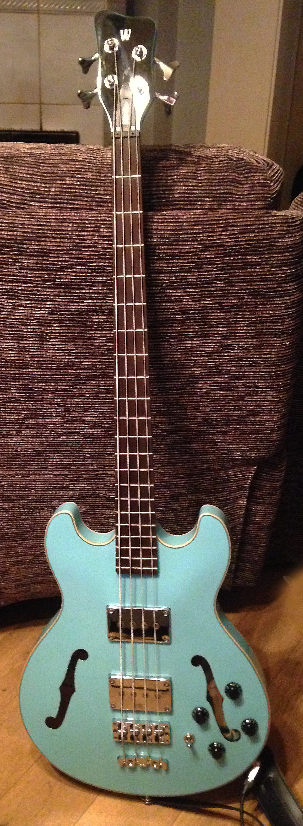 SB